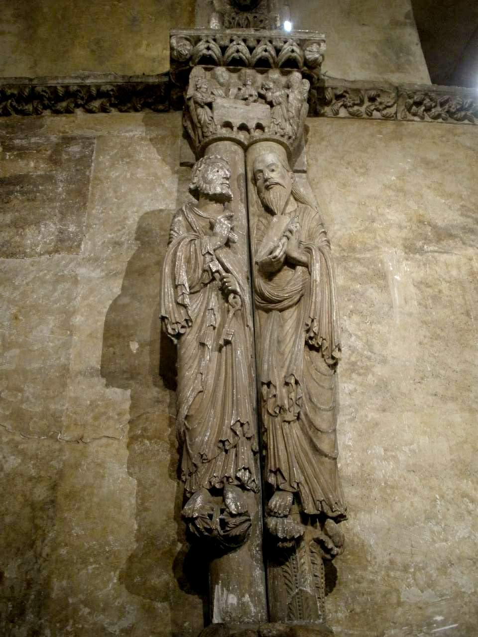 Cámara Santa de la Catedral de Oviedo (Asturias)